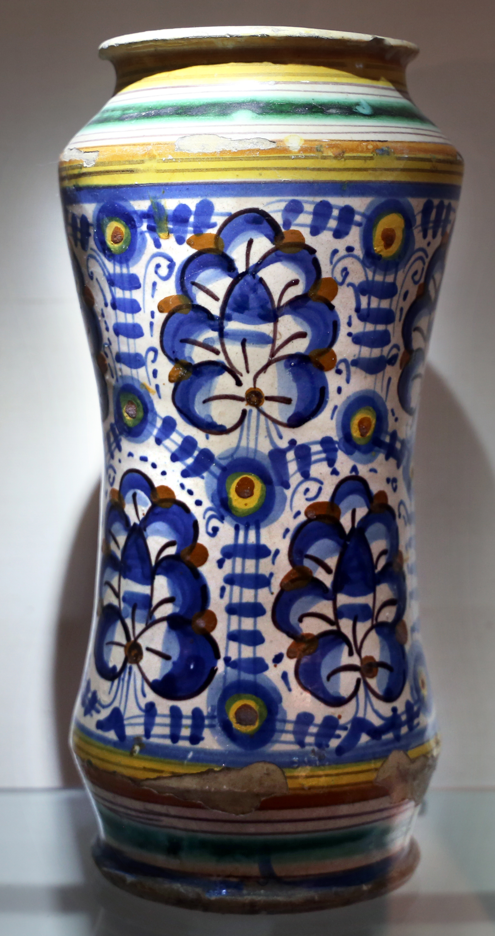 Museo di Arte Sacra (Massa Marittima) This is a photo of a monument which is part of cultural heritage of Italy.